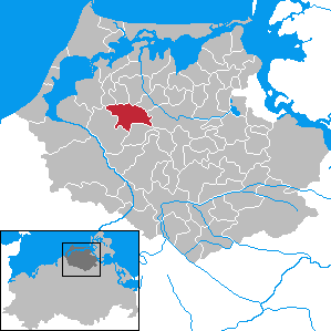 Trinwillershagen in Mecklenburg-Vorpommern - District Nordvorpommern